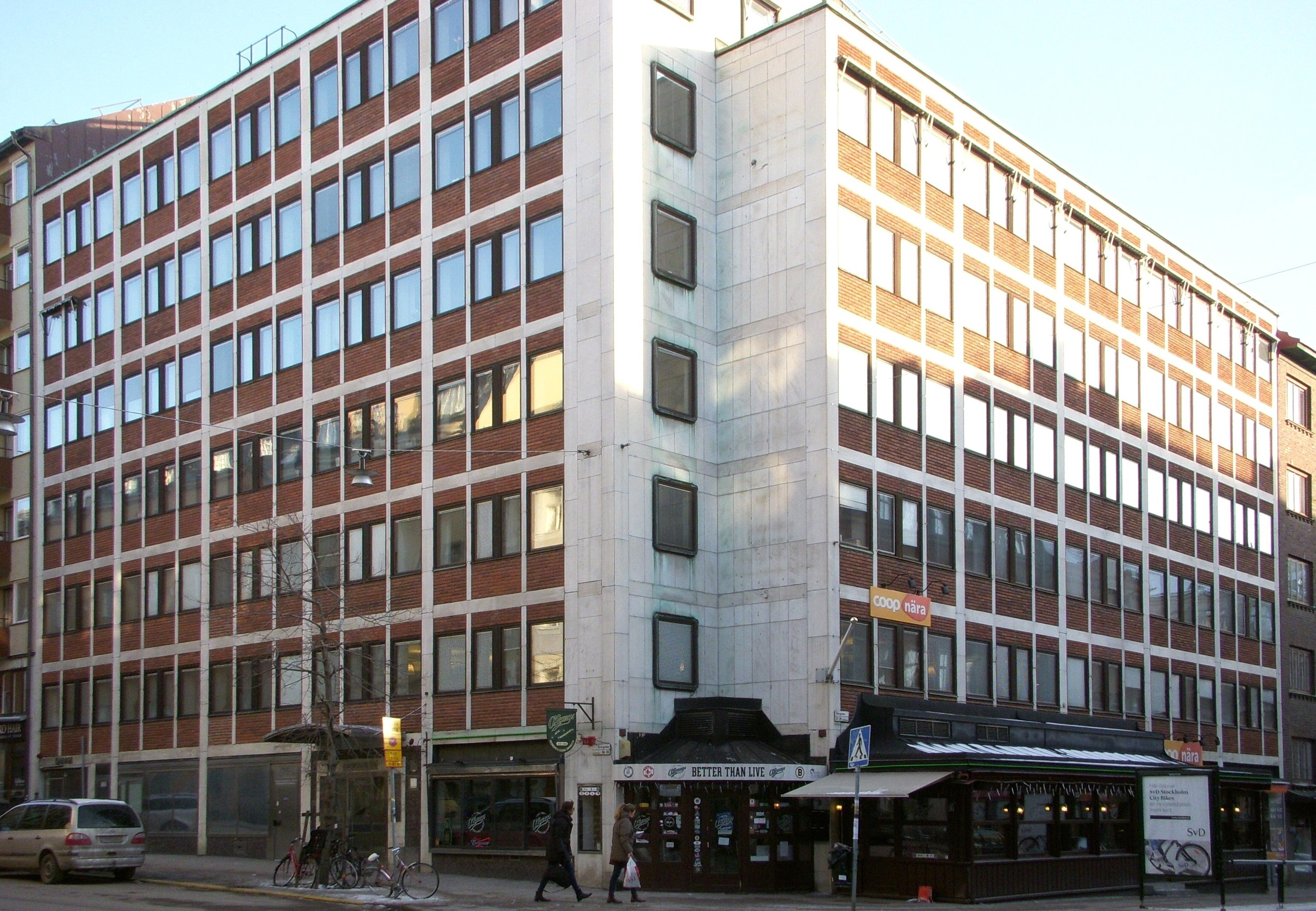 Fastigheten "Neptunus 31", Storgatan 27, Stockholm